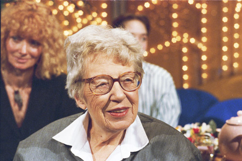 Annie M.G.Schmidt in 1989 tijdens een uitzending van Service Salon.